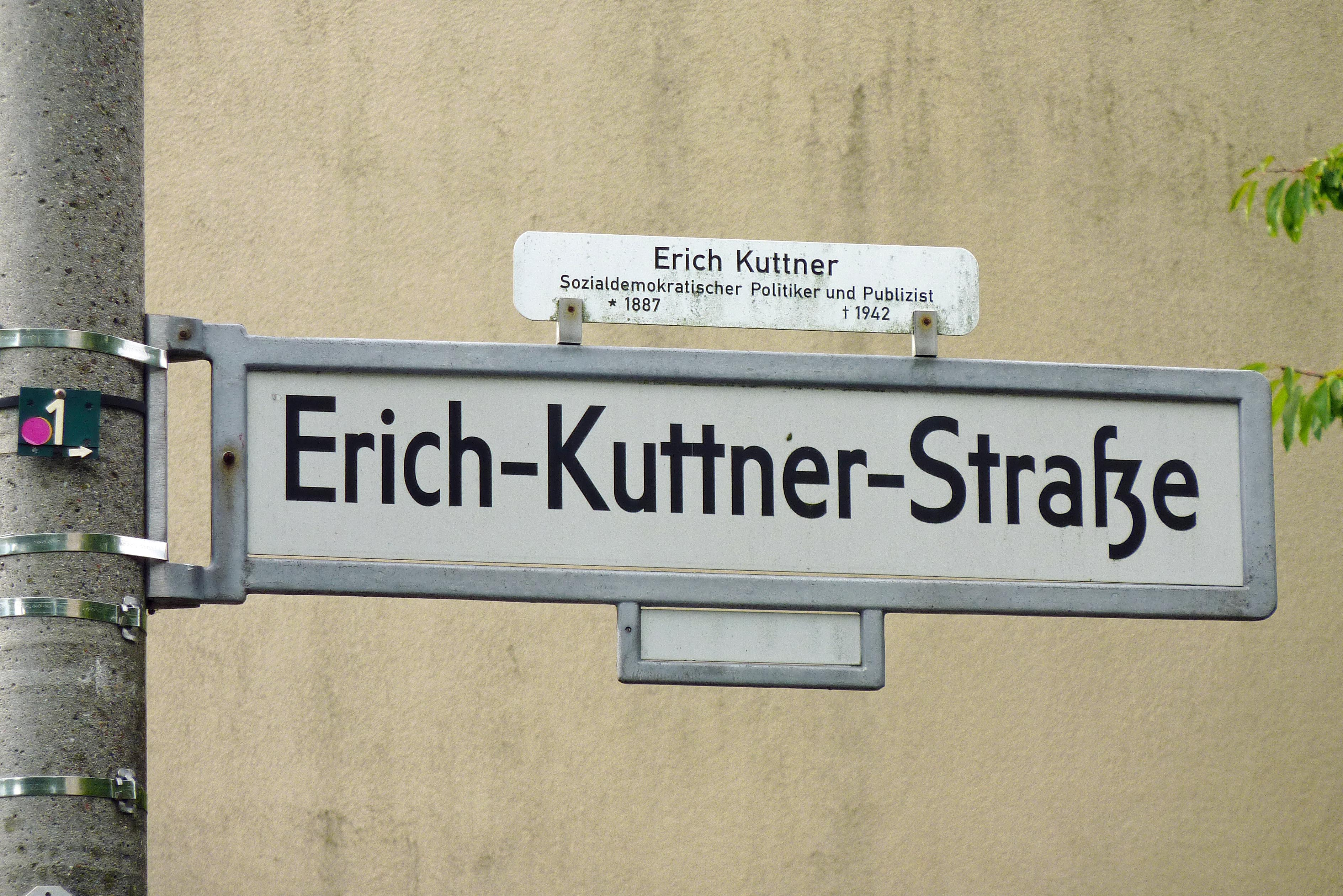 Straßenschild der Erich-Kuttner-Straße an der Ecke zur Franz-Jacob-Straße, in Berlin Fennpfuhl.